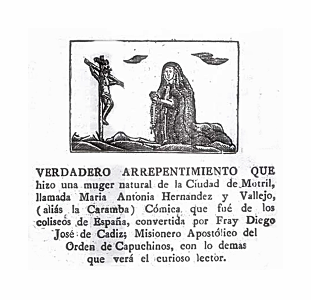 Maria Antonia Vallejo Fernández la Caramba convertida